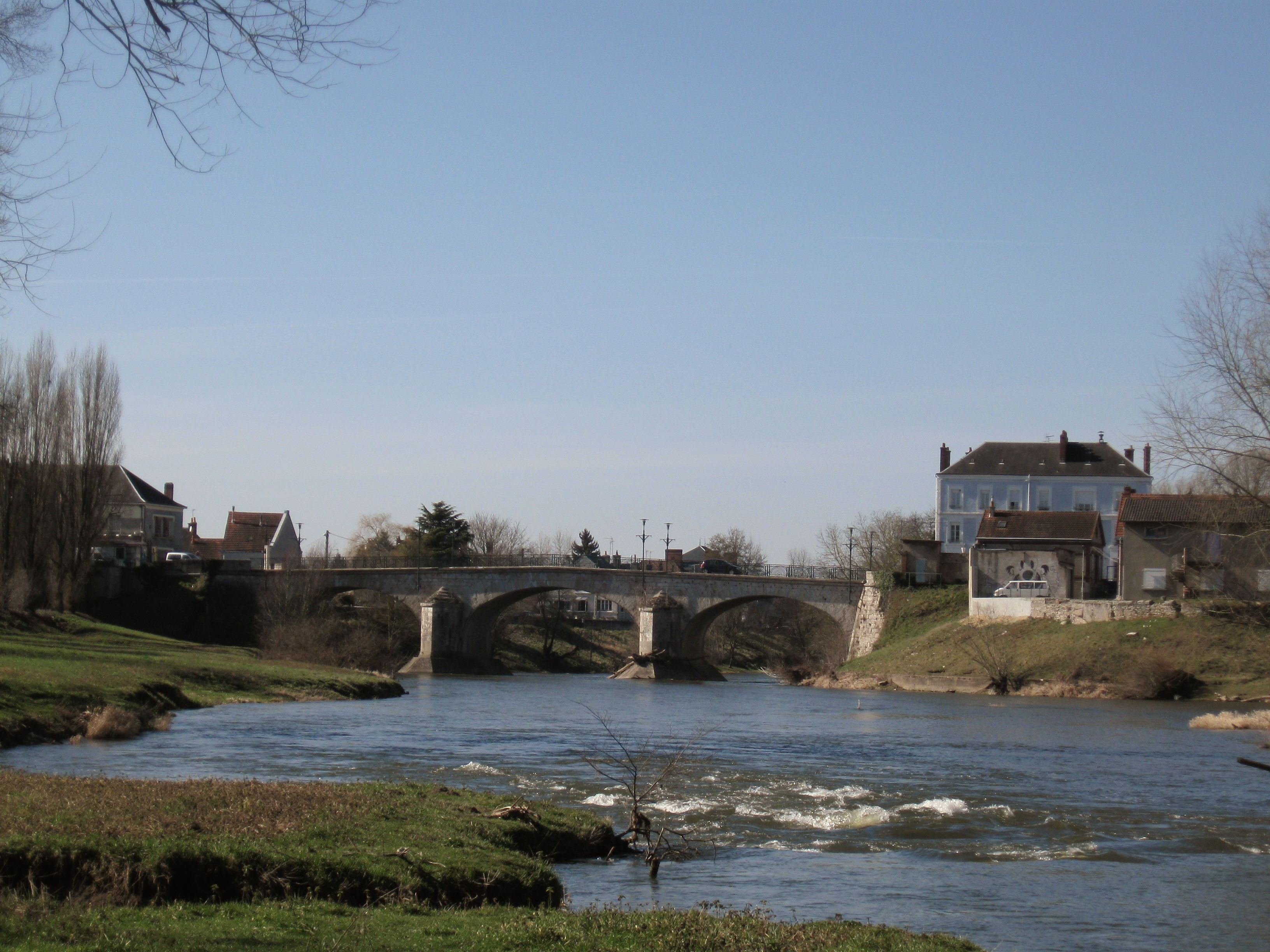 Le Cher à Vierzon, Cher, France